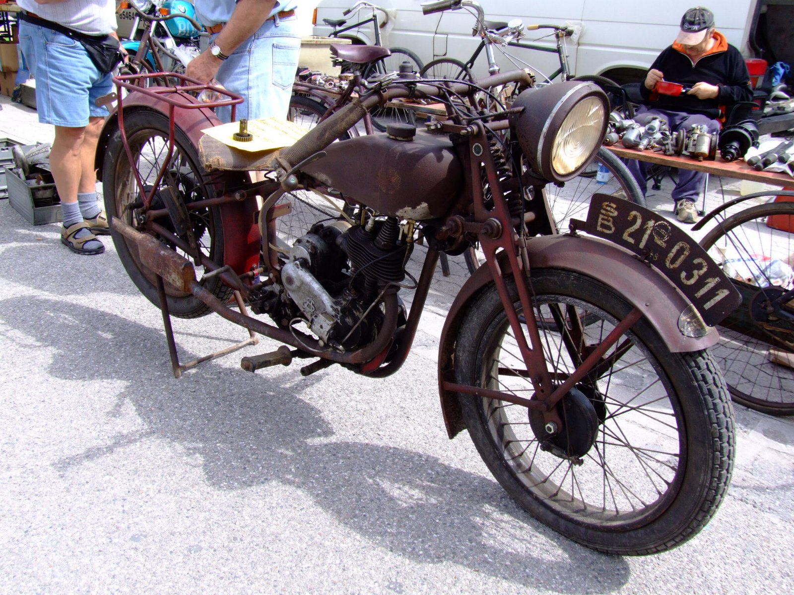 Nestoria STA 200 del 1929 - 198 cc, 5 CV, prodotta dal 1928 al 1931 dalla Nestoria Motorenwerk GmbH di Norimberga